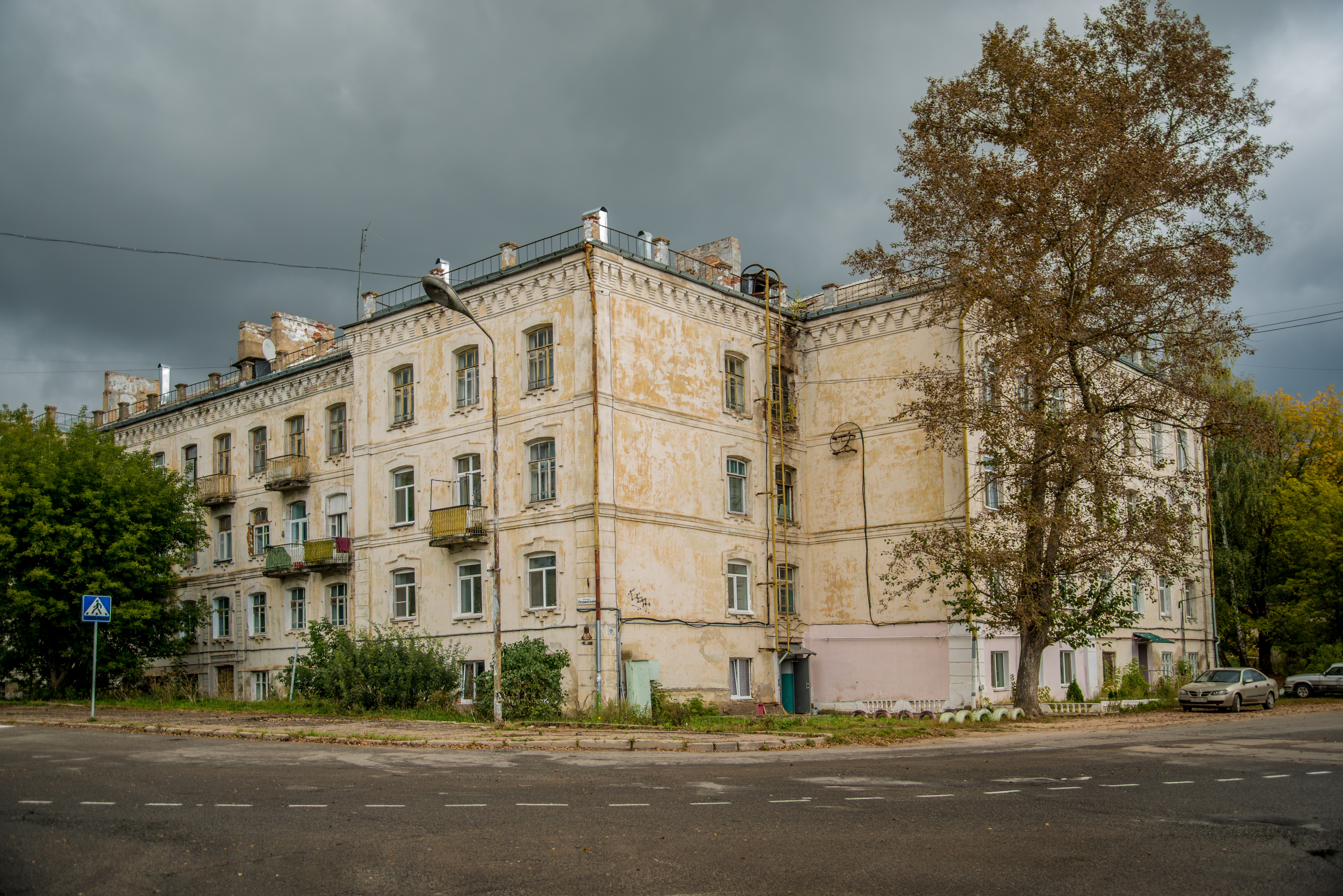 Дом жилой: улица Ленинская, 2, Ярцево, Ярцевский район, Смоленская область